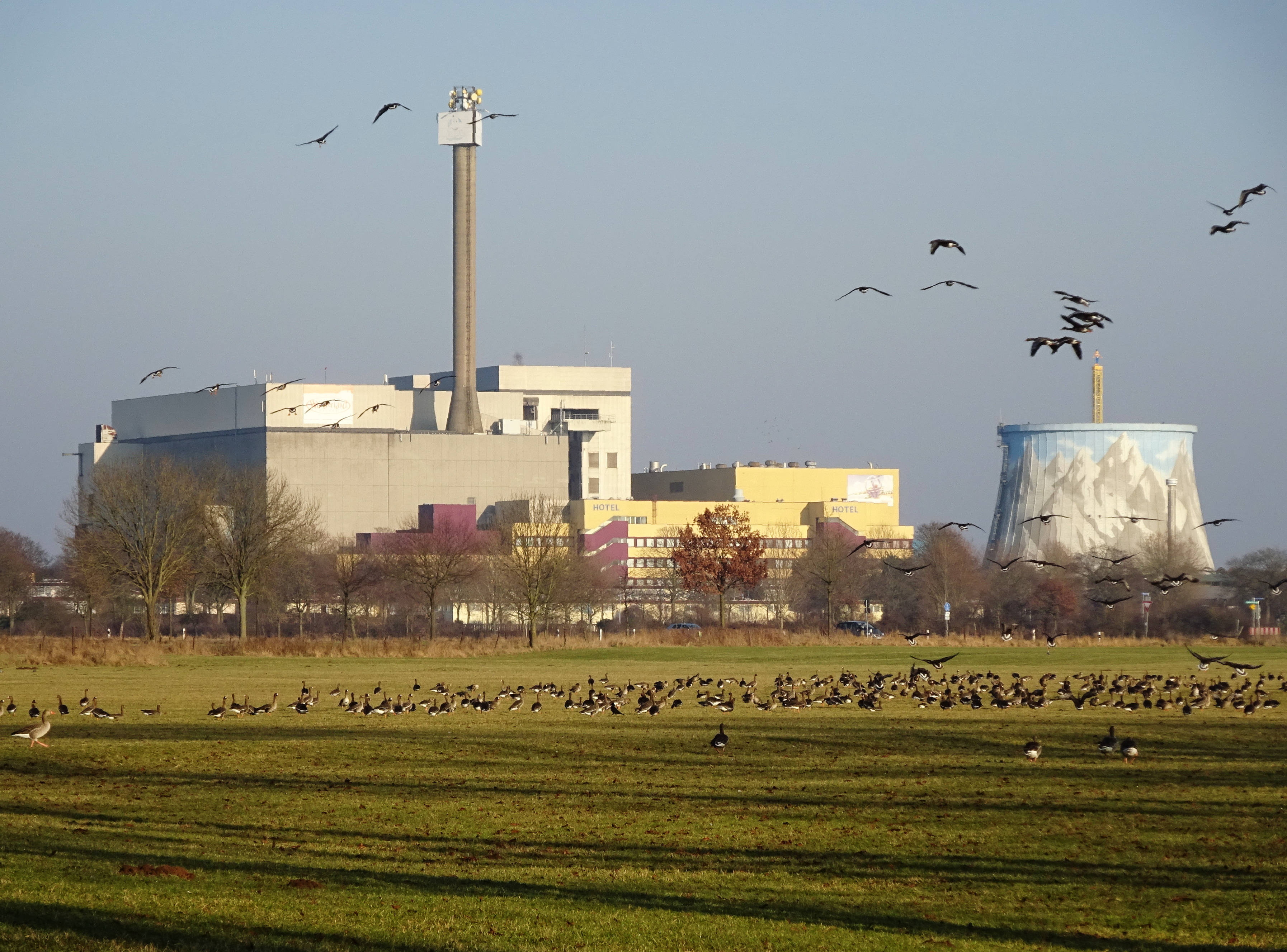 Wunderland Kalkar met op de voorgrond grauwe ganzen op een weide. Omgeving Wisseler See / Wisselward